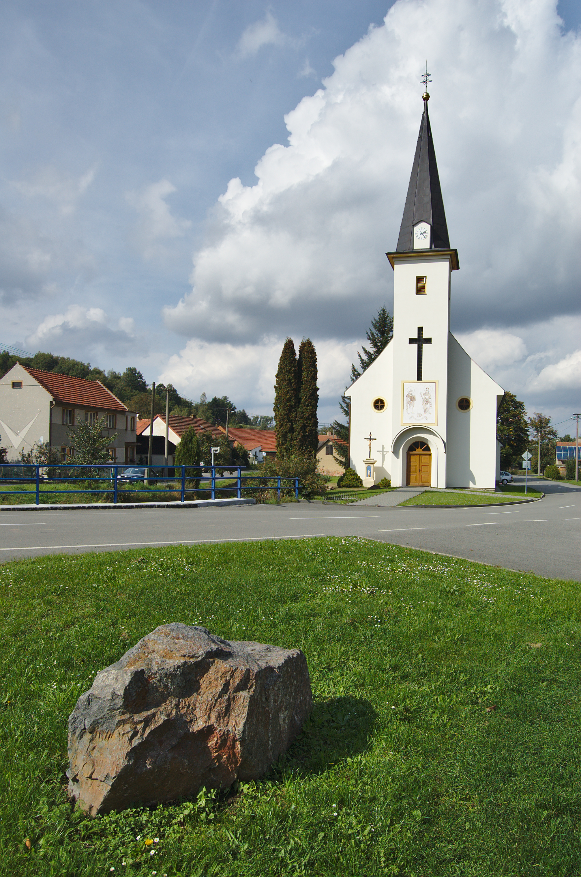 Kostel svatého Cyrila a Metoděje, Úsobrno, okres Blansko